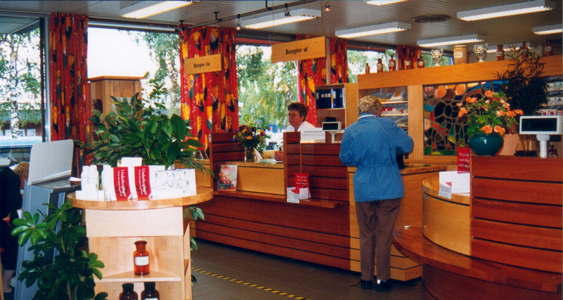 Land apotek, Dokka